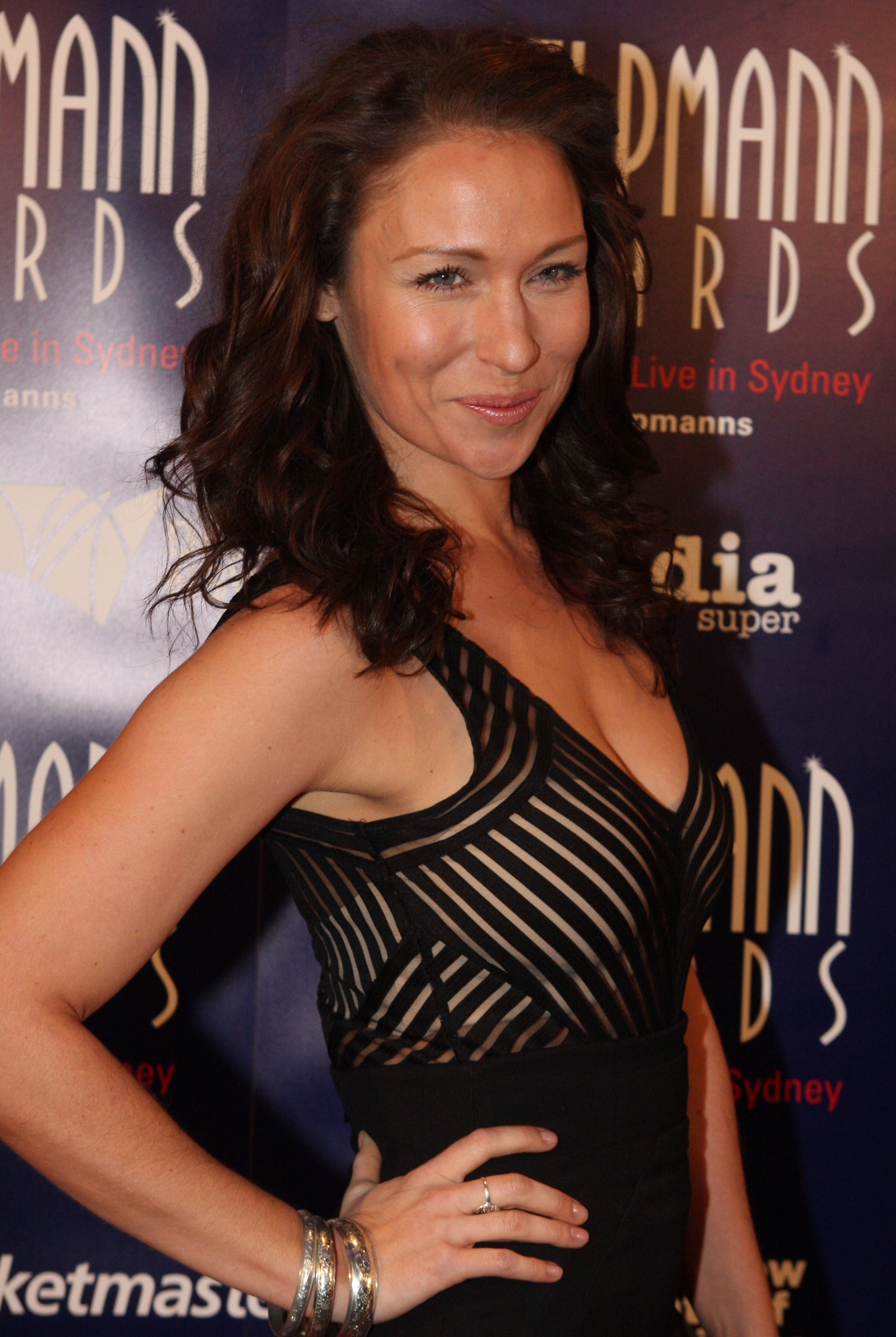 Lisa Gormley